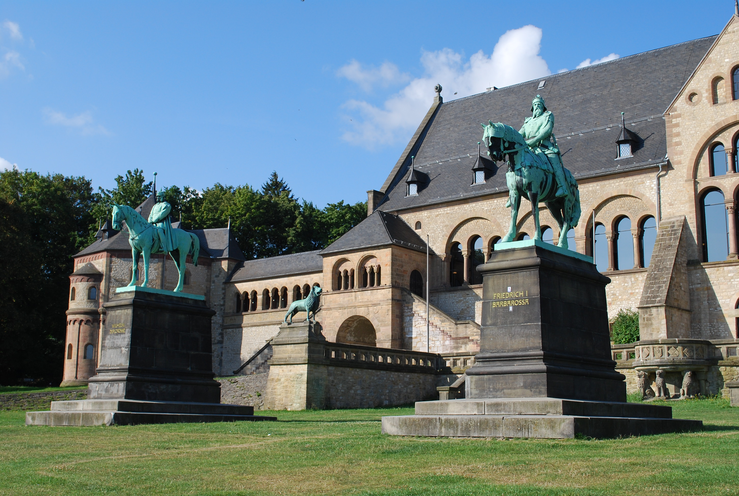 Дворец Кайзера